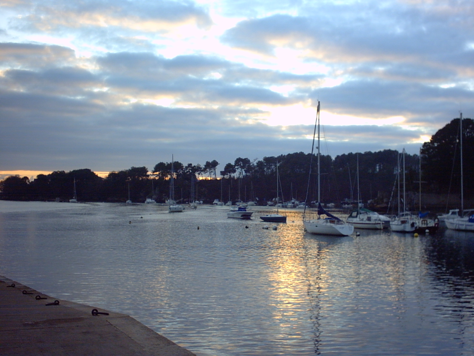 Au mouillage au port de Conleau. Photo prise le 26 décembre 2005